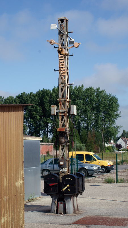 Signaux Lartigues en gare de Rue sur la Ligne Boulogne/Amiens